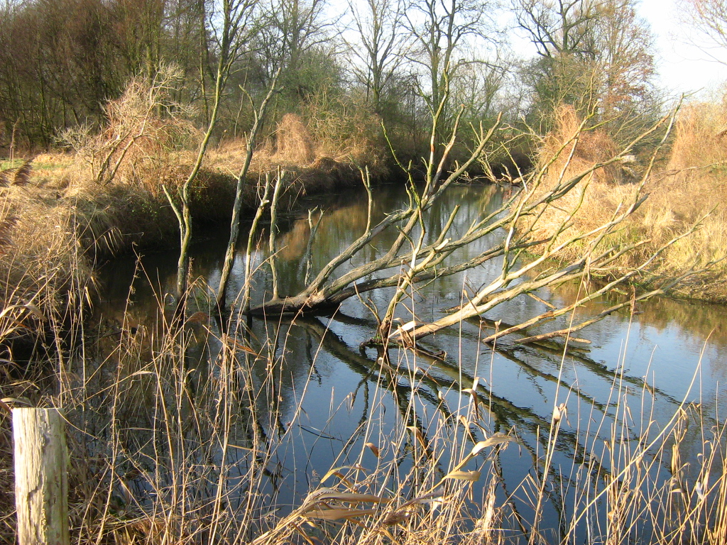 Schnelle Havel bei Bischofswerder (Landkreis Oberhavel, Brandenburg).